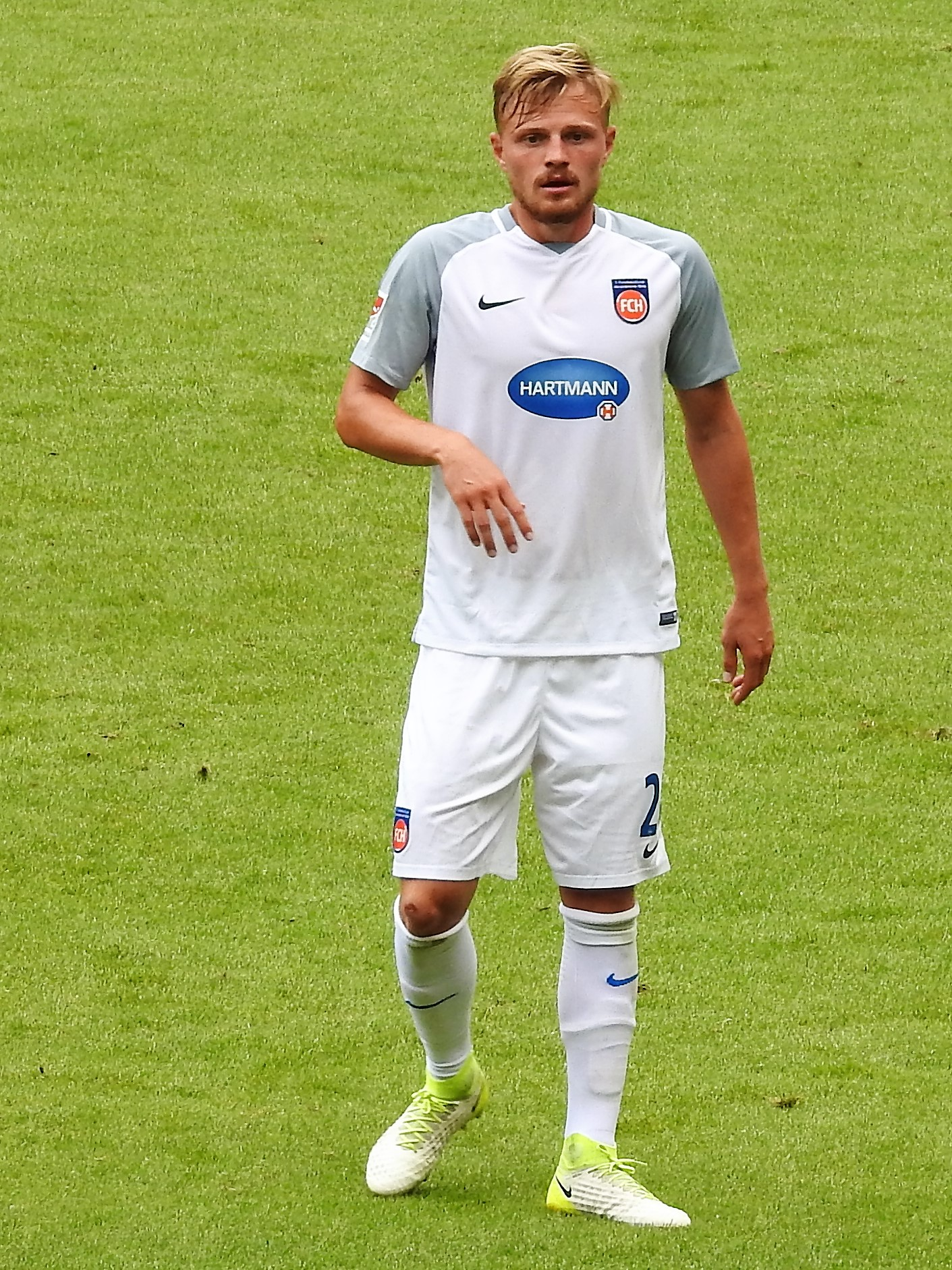 Marcel Titsch-Rivero Heidenheim